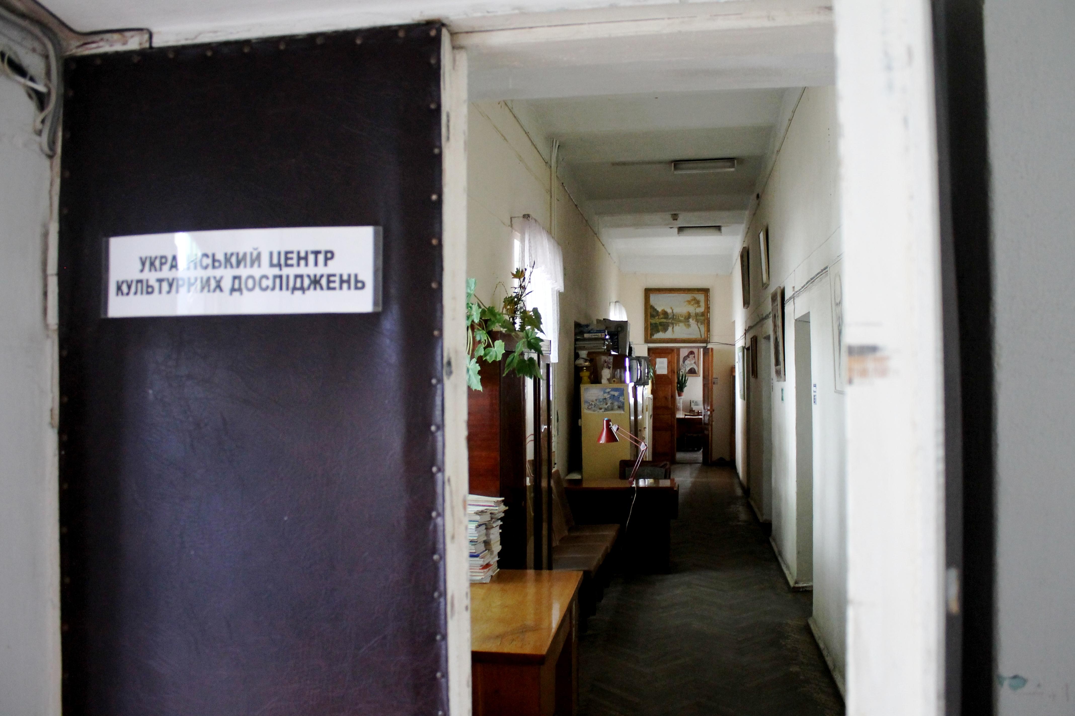 Український центр культурних досліджень